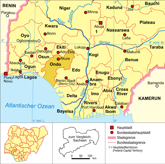 Politische Karte Nigerias (Bundesstaat Ogun hervorgehoben)